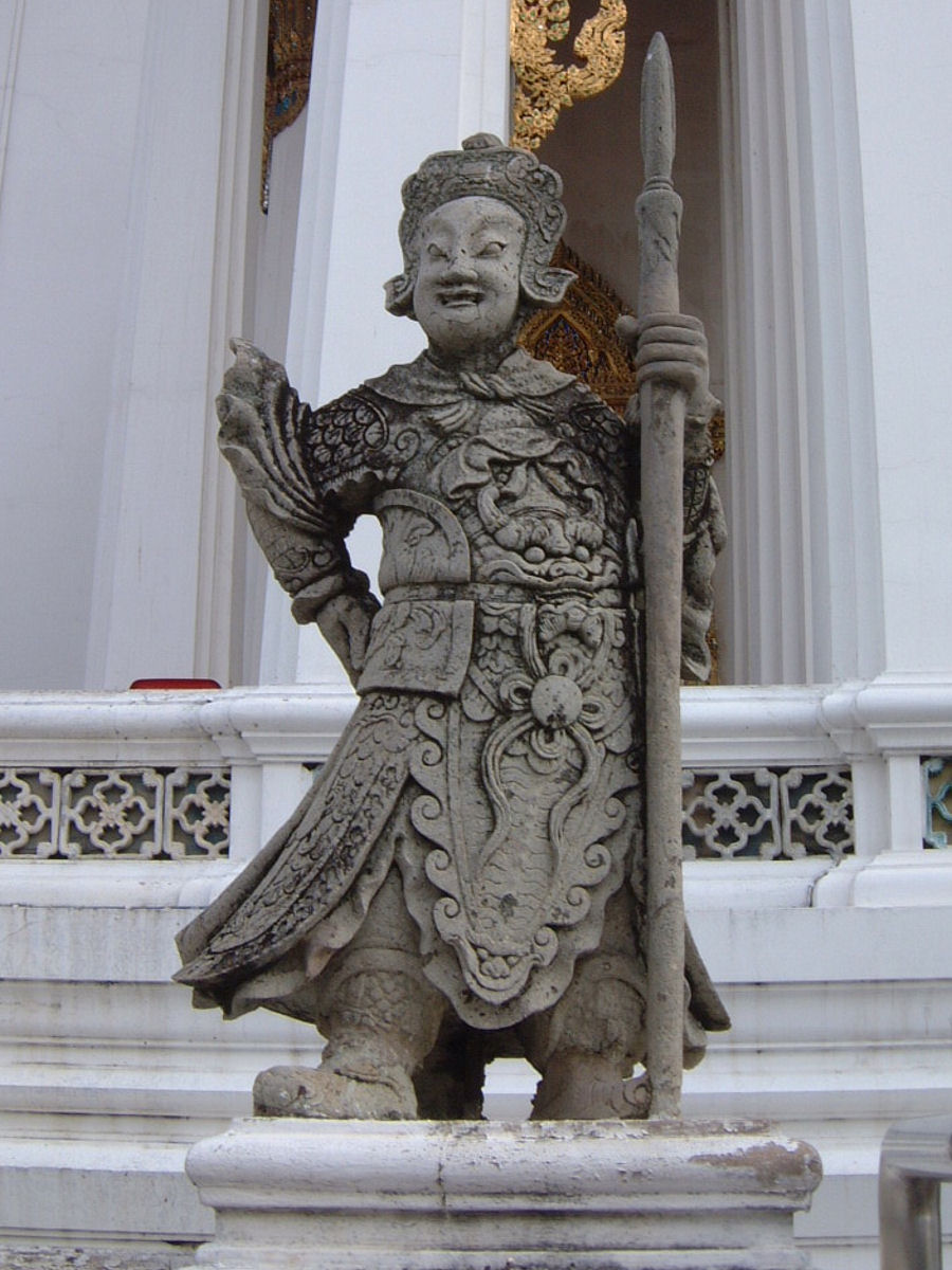 Wat Suthat, Bangkok, Thailand